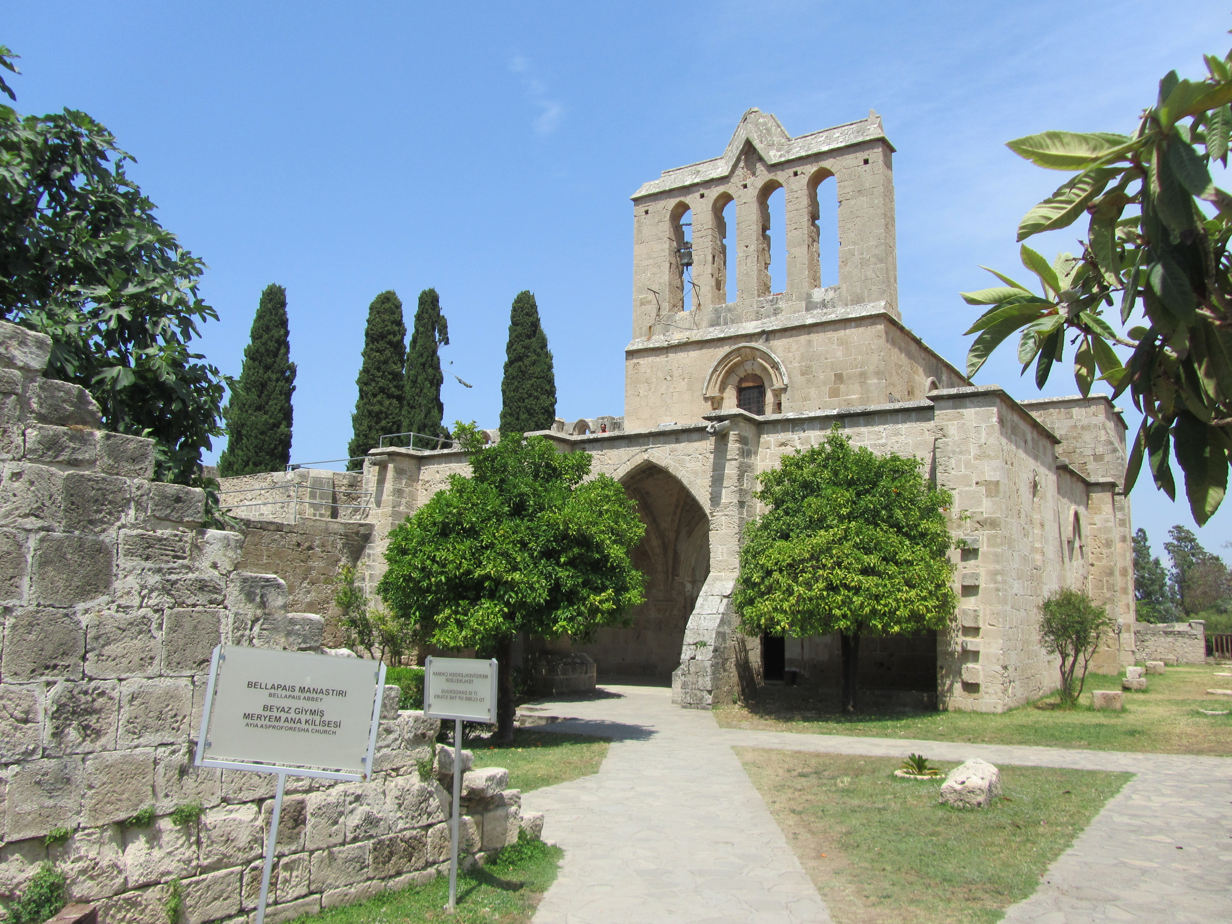 Bellapais Abbey, Bellapais, Kyrenia, Cyprus. Июнь 2012